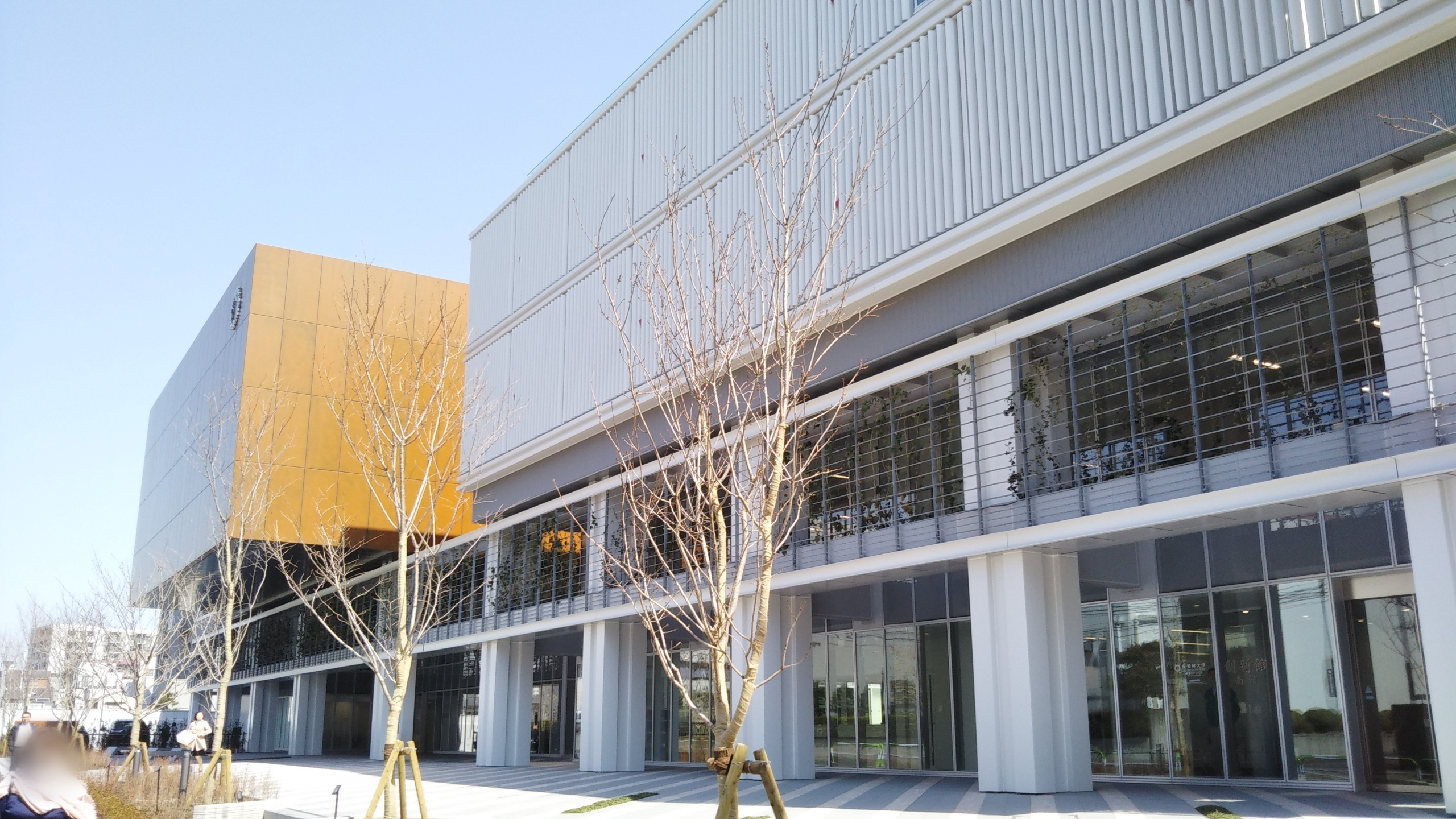 桜美林大学新宿キャンパス